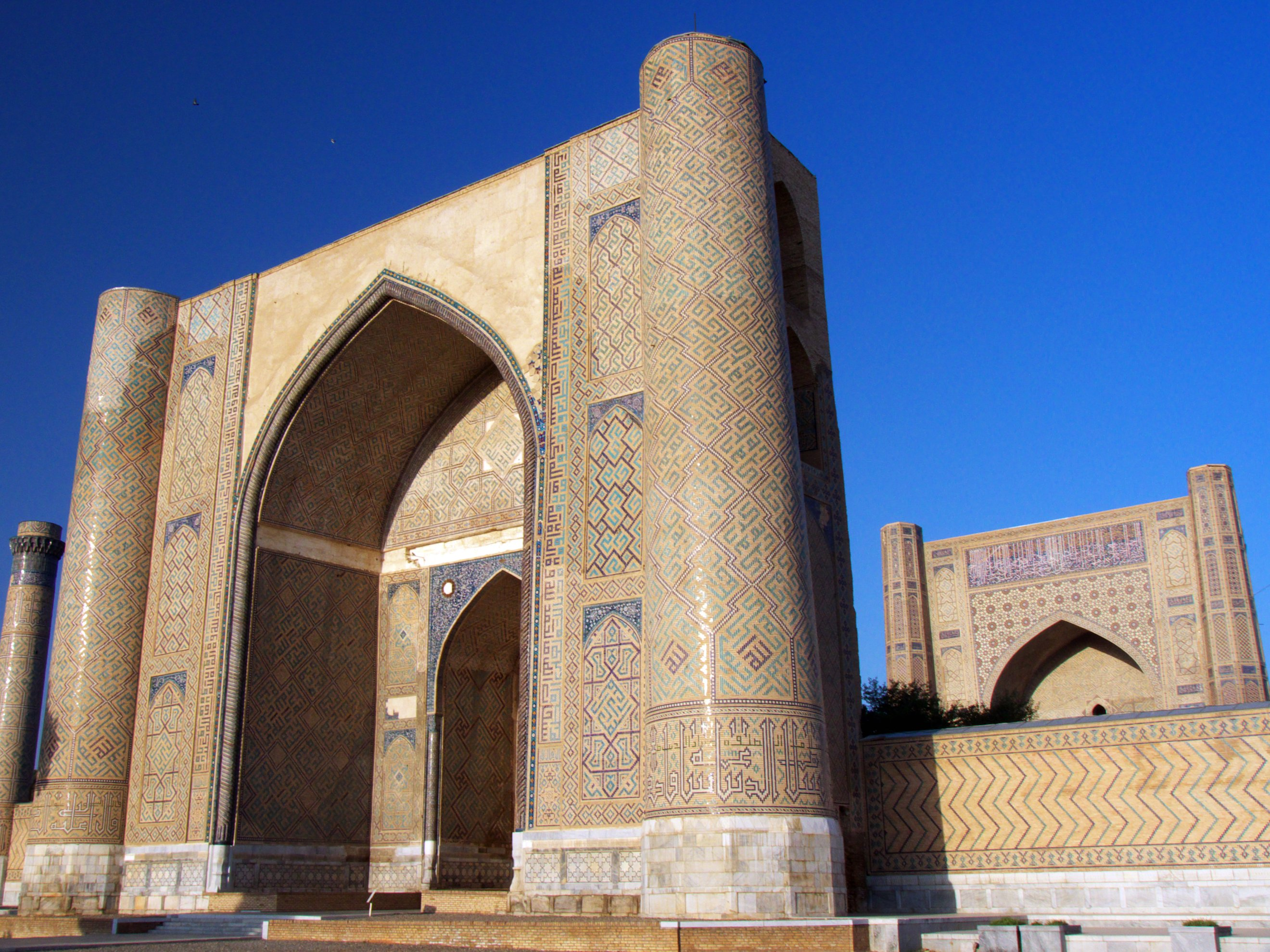 Bibi Khanum Mosque, Samarkand